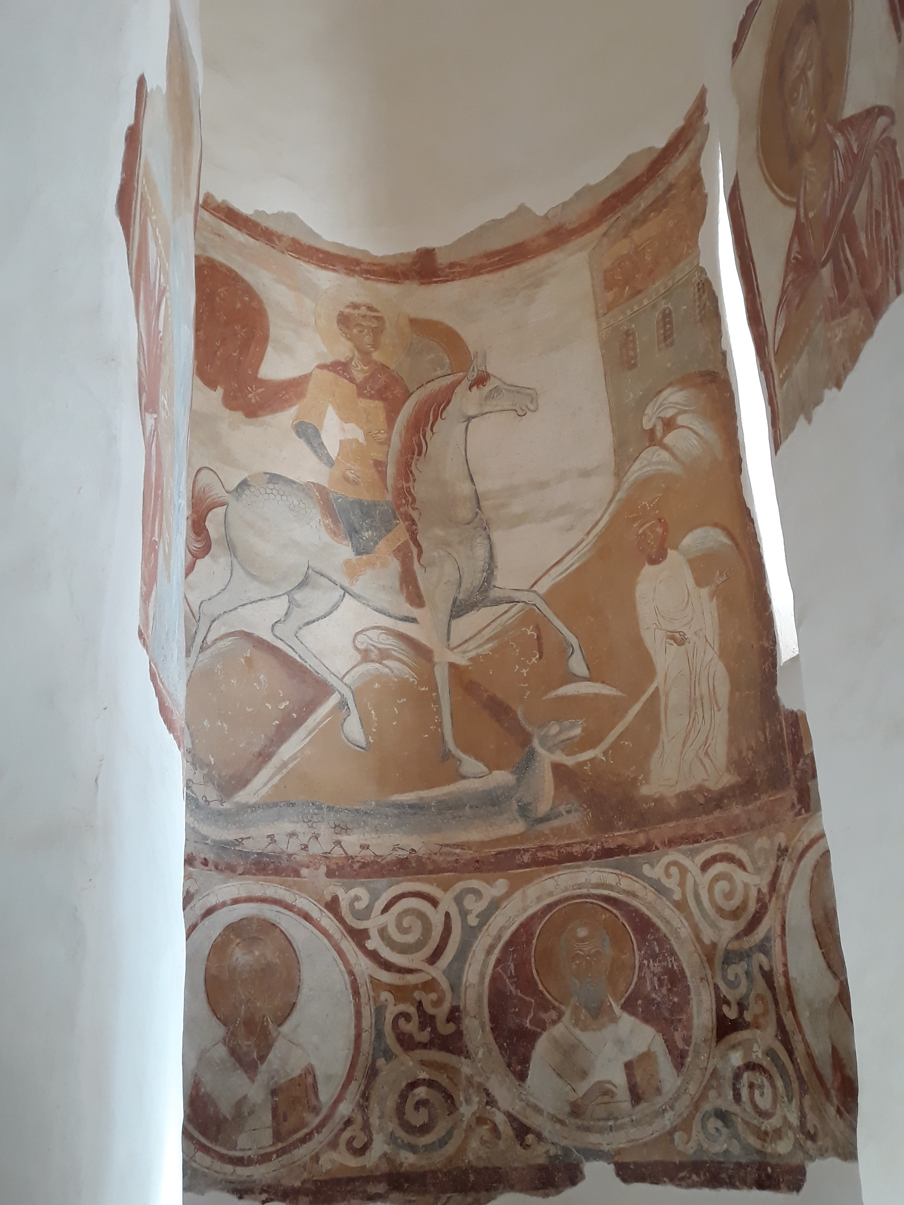 Церковь Георгия Победоносца: Волховский проспект, 39 (Староладожская крепость), Старая Ладога, Волховский район, Ленинградская область